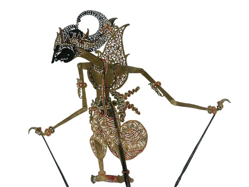 Schaduwfiguur. Wajangpop, voorstellende Wibisana Unknown language: Wayang kulit purwa